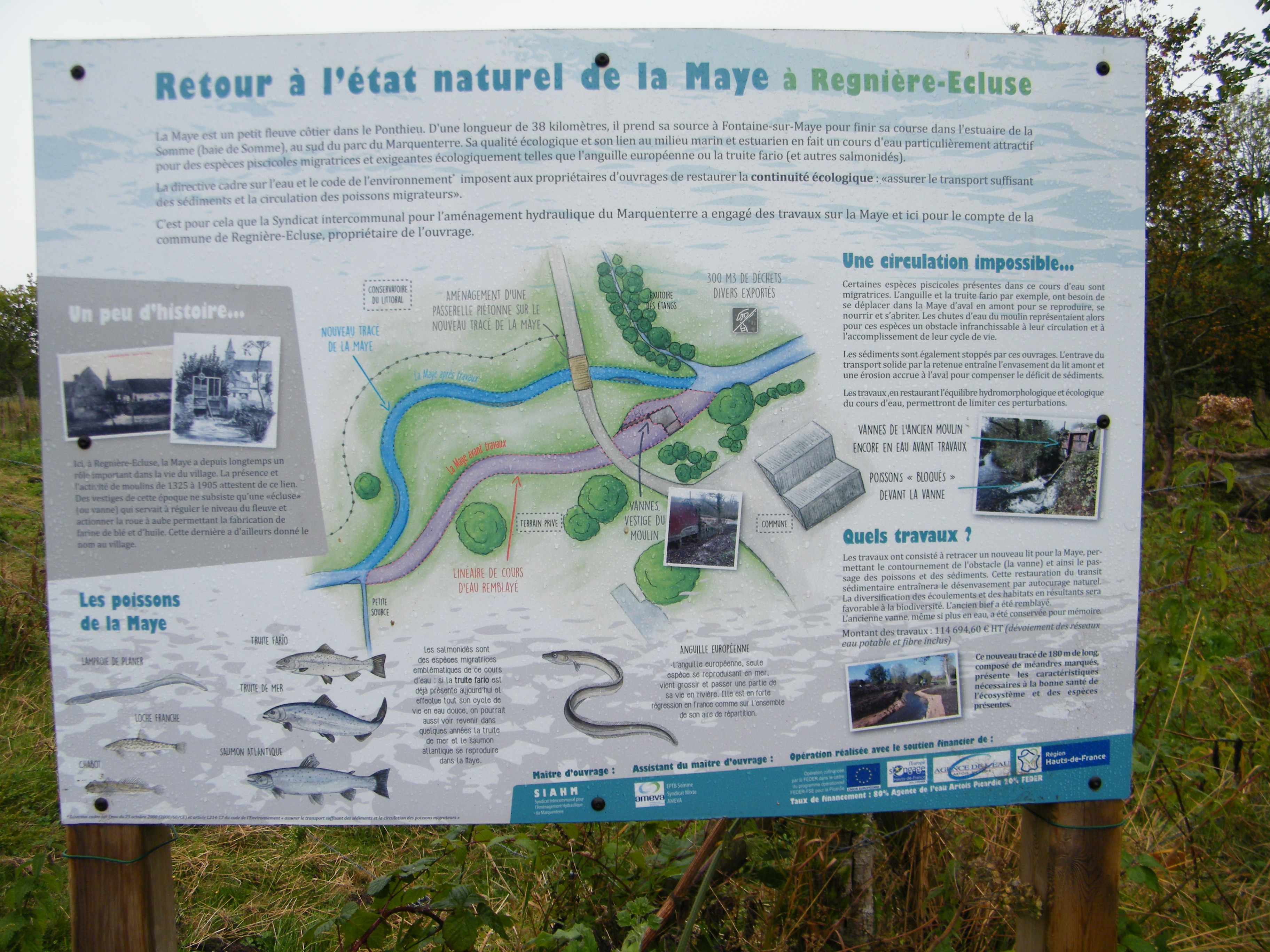 Regnière-Ecluse, 80, Fr, La Maye, panneau